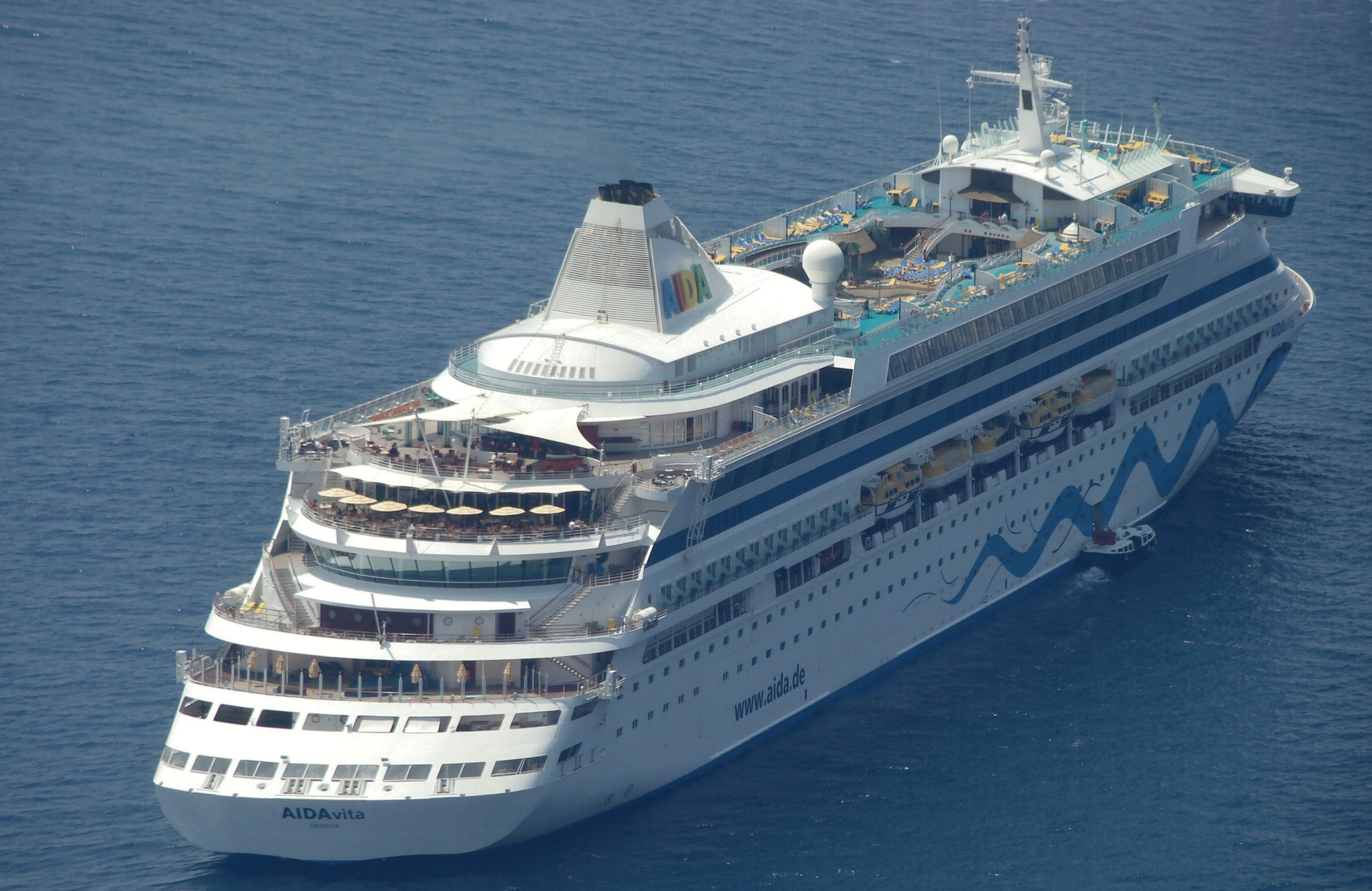 AIDAvita auf Reede vor Thira, Santorin (Griechenland)